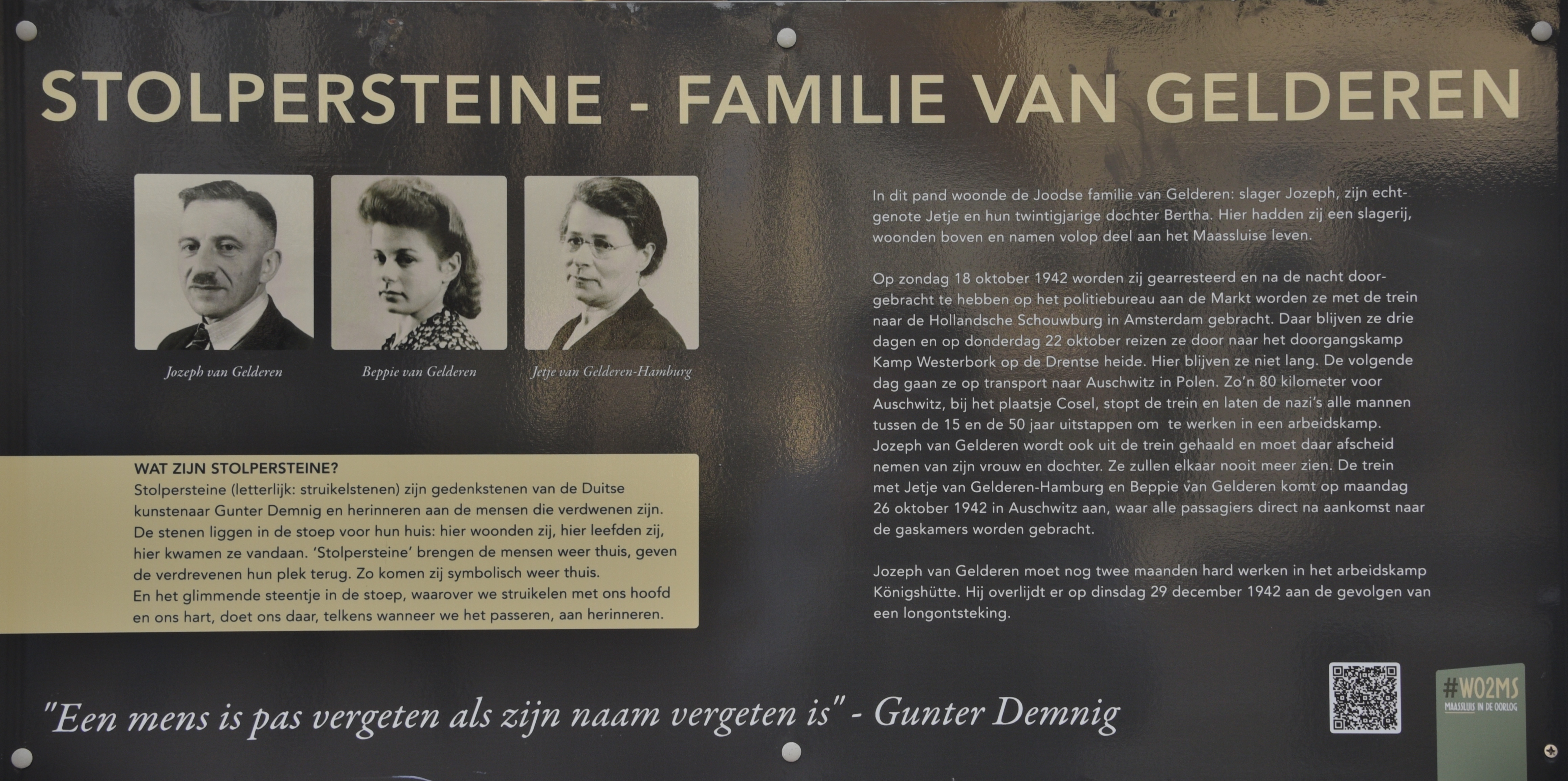 Informationstafel zu den Stolpersteinen für Familie van Gelderen